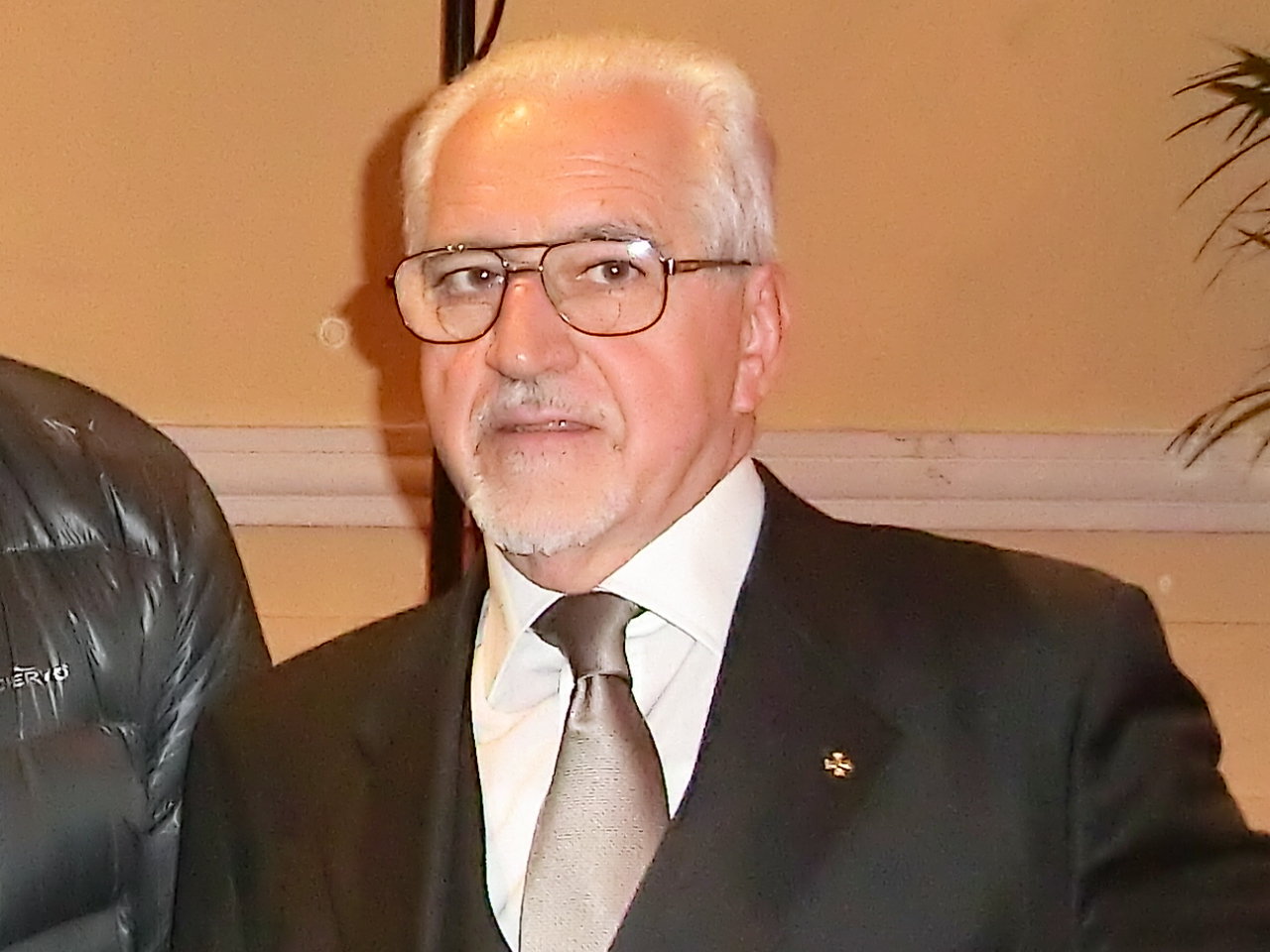 Aldo Mola a Sanremo alla presentazione di un libro